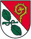 Wappen der Gemeinde Pischelsdorf am Engelbach in Österreich